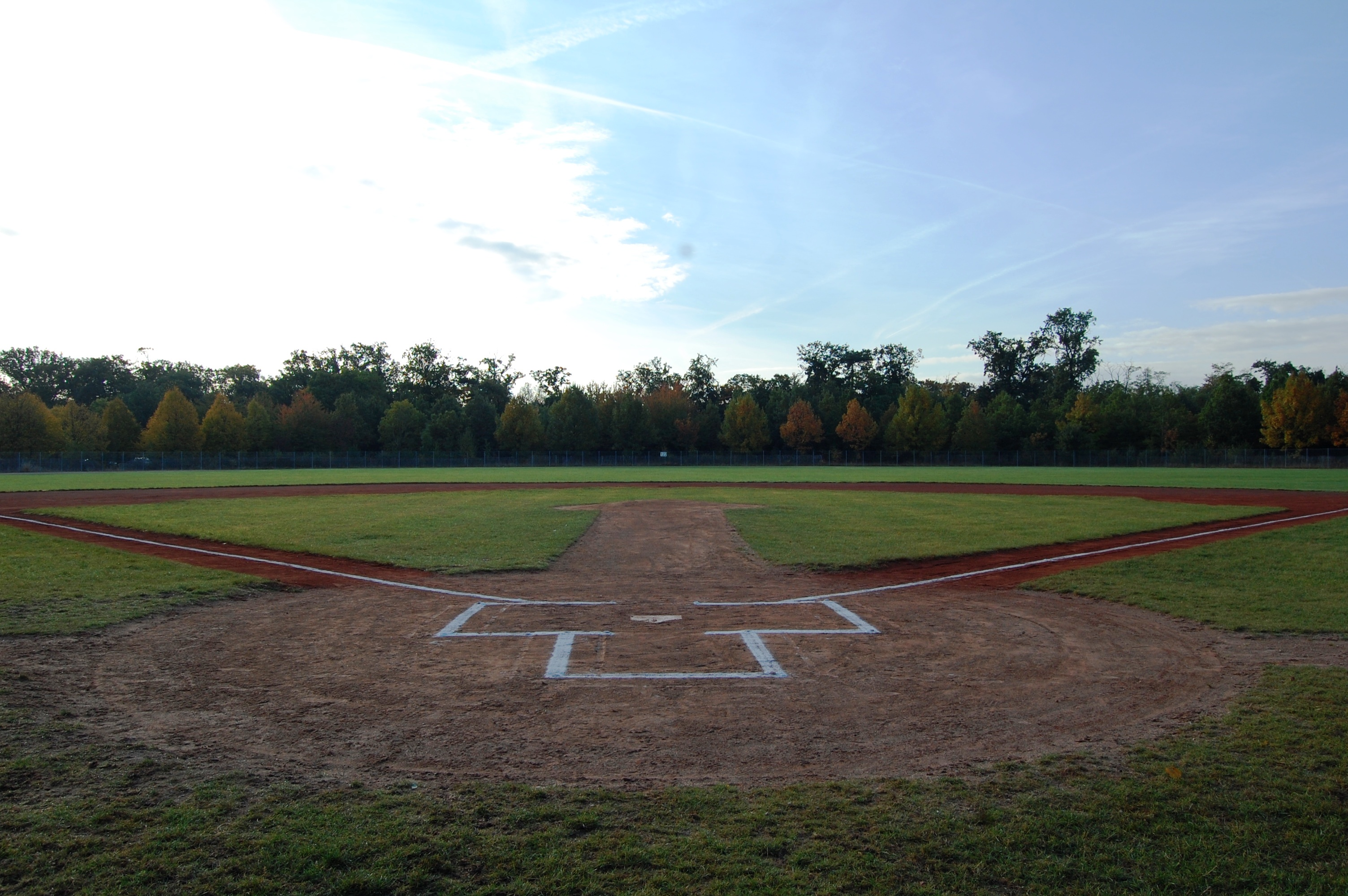 Description Le terrain de baseball du PUC. Voir ci-dessous Le terrain de baseball du PUC.